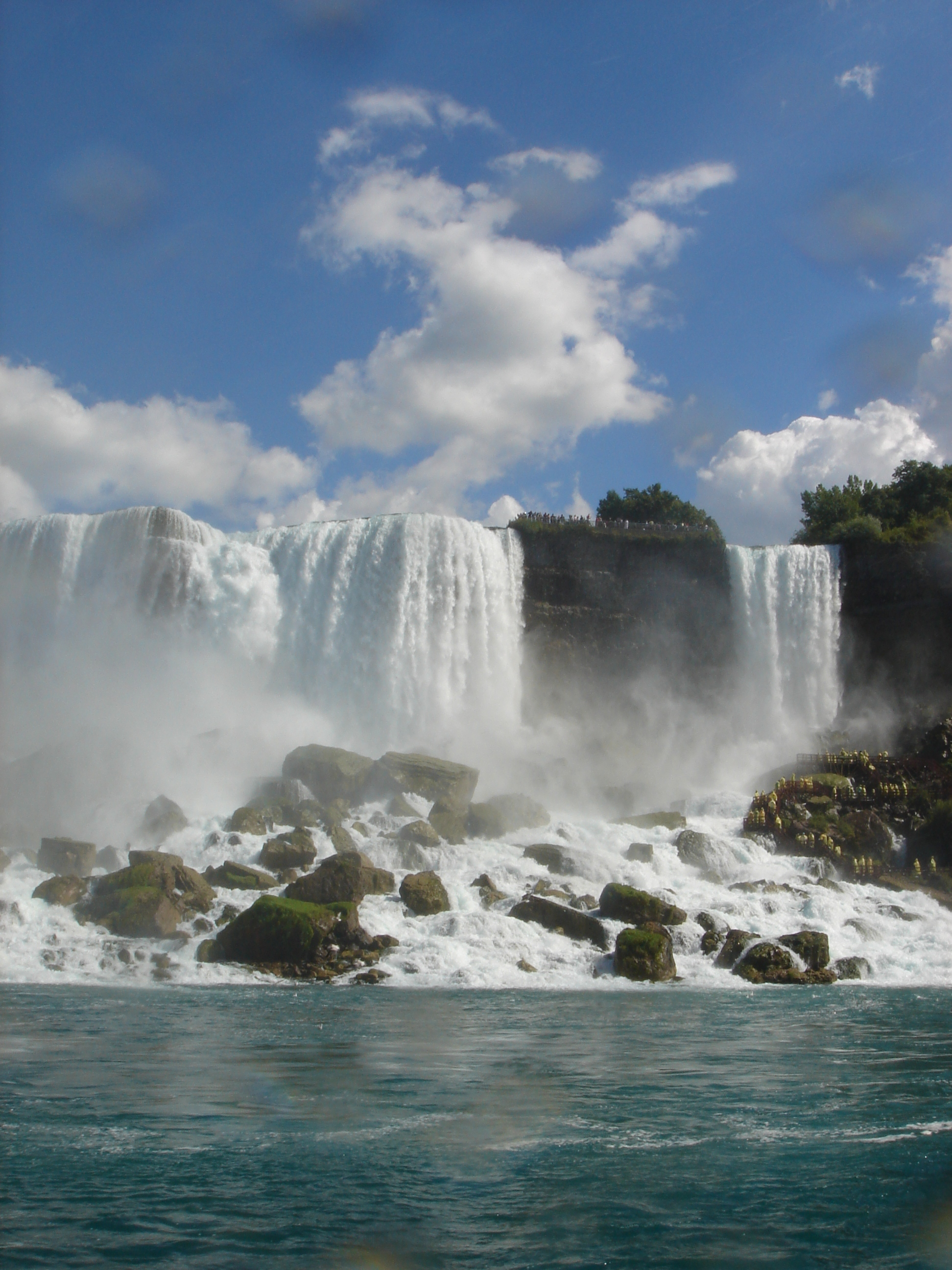 Cataratas del Niagara (EEUU/Canadá)